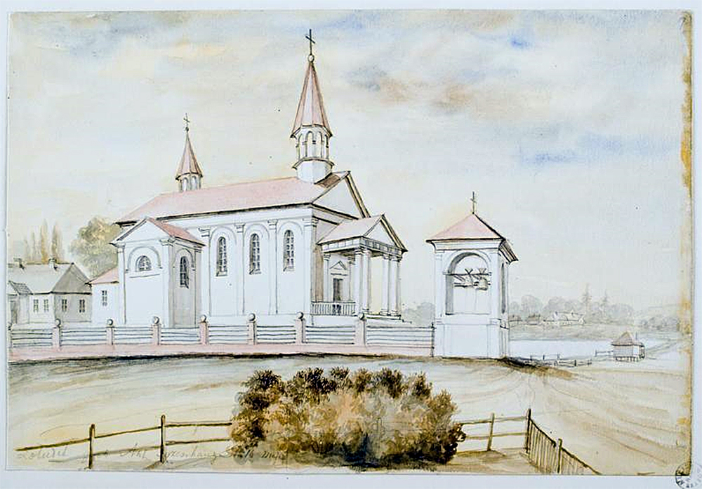 Беларуская (тарашкевіца): Жалудок (Žałudok), вуліца Касьцельная (vulica Kaścielnaja). Касьцёл